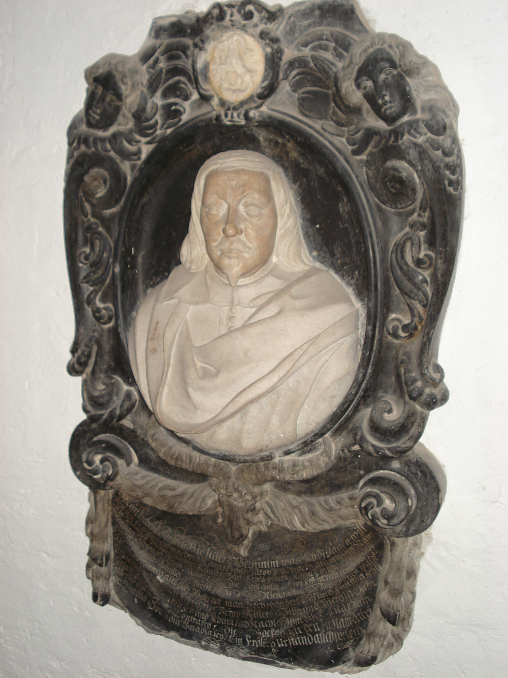 Pock_J.J._Epitaph